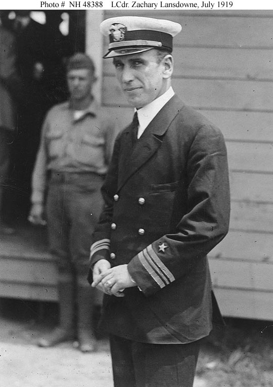 Lieutenant Commander Zachary Lansdowne, USN